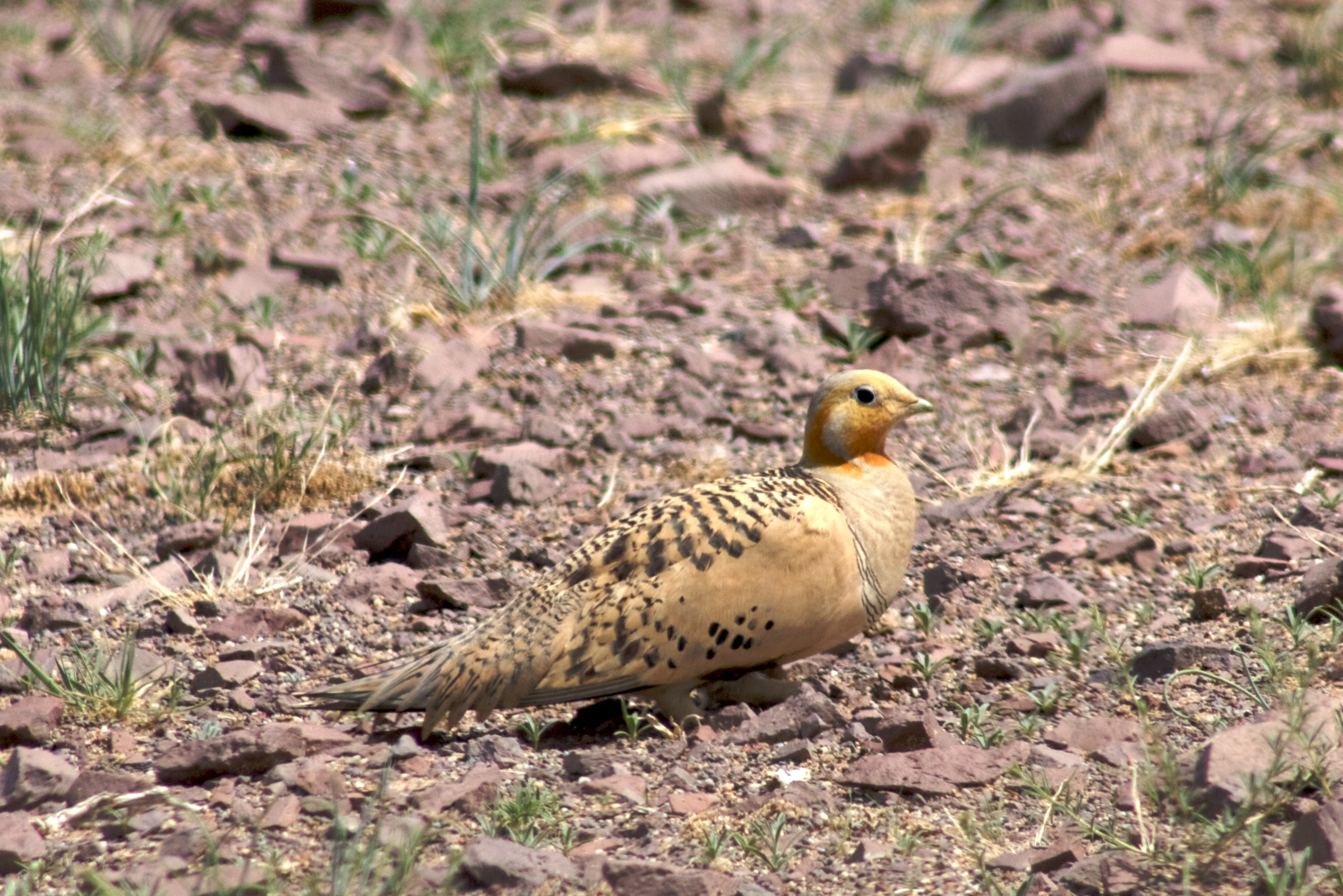 Syrrhapte paradoxal, désert de Gobi - Mongolie